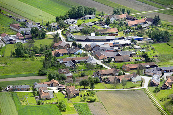 Radamos